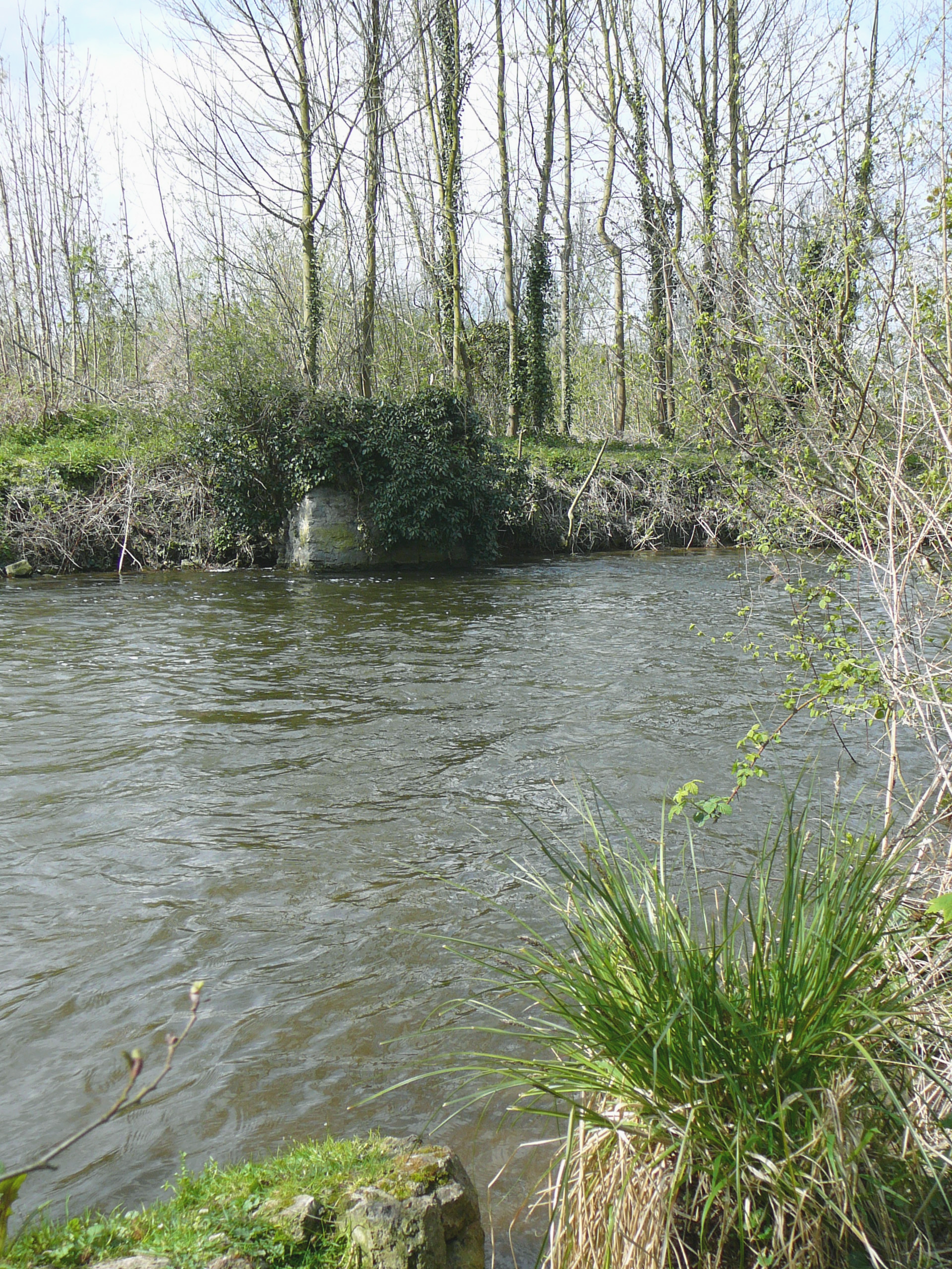 Essonne (rivière) sur les berges de Ballancourt-sur-essonne